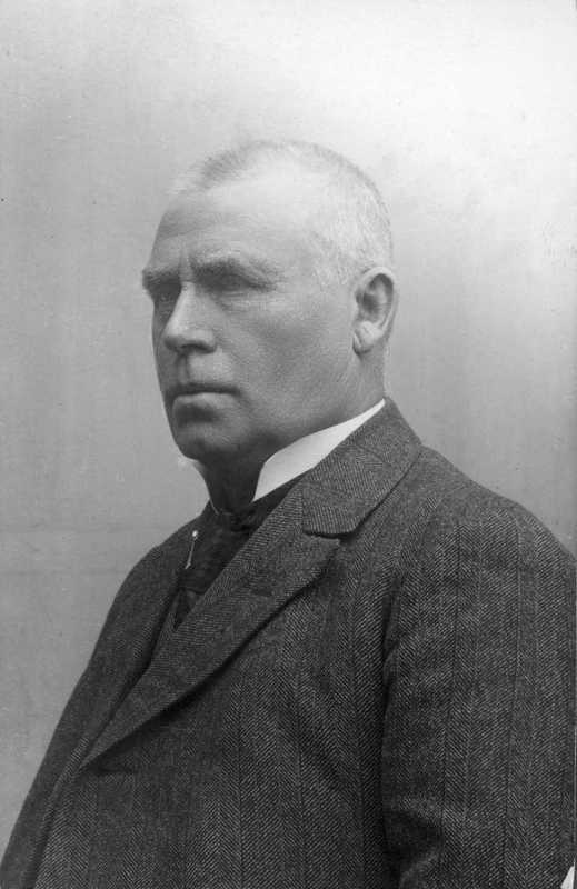 Portrett av fotograf Narve Skarpmoen.